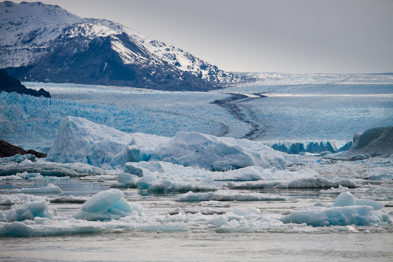 Upsala Glacier, Province of Santa Cruz, Argentina.